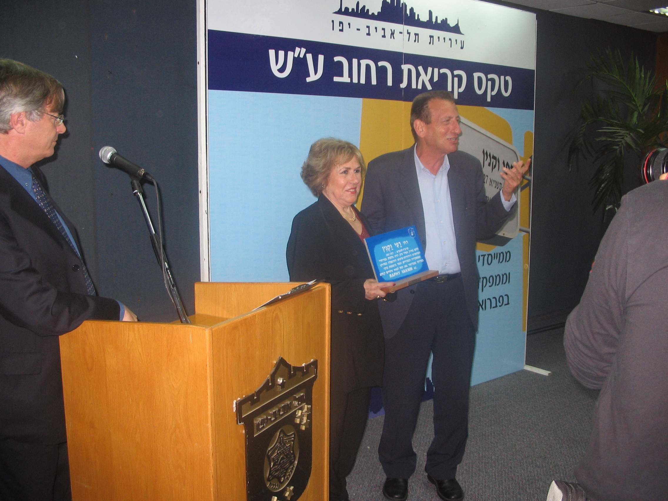 מרי וקנין מקבלת את השלט מחולדאי